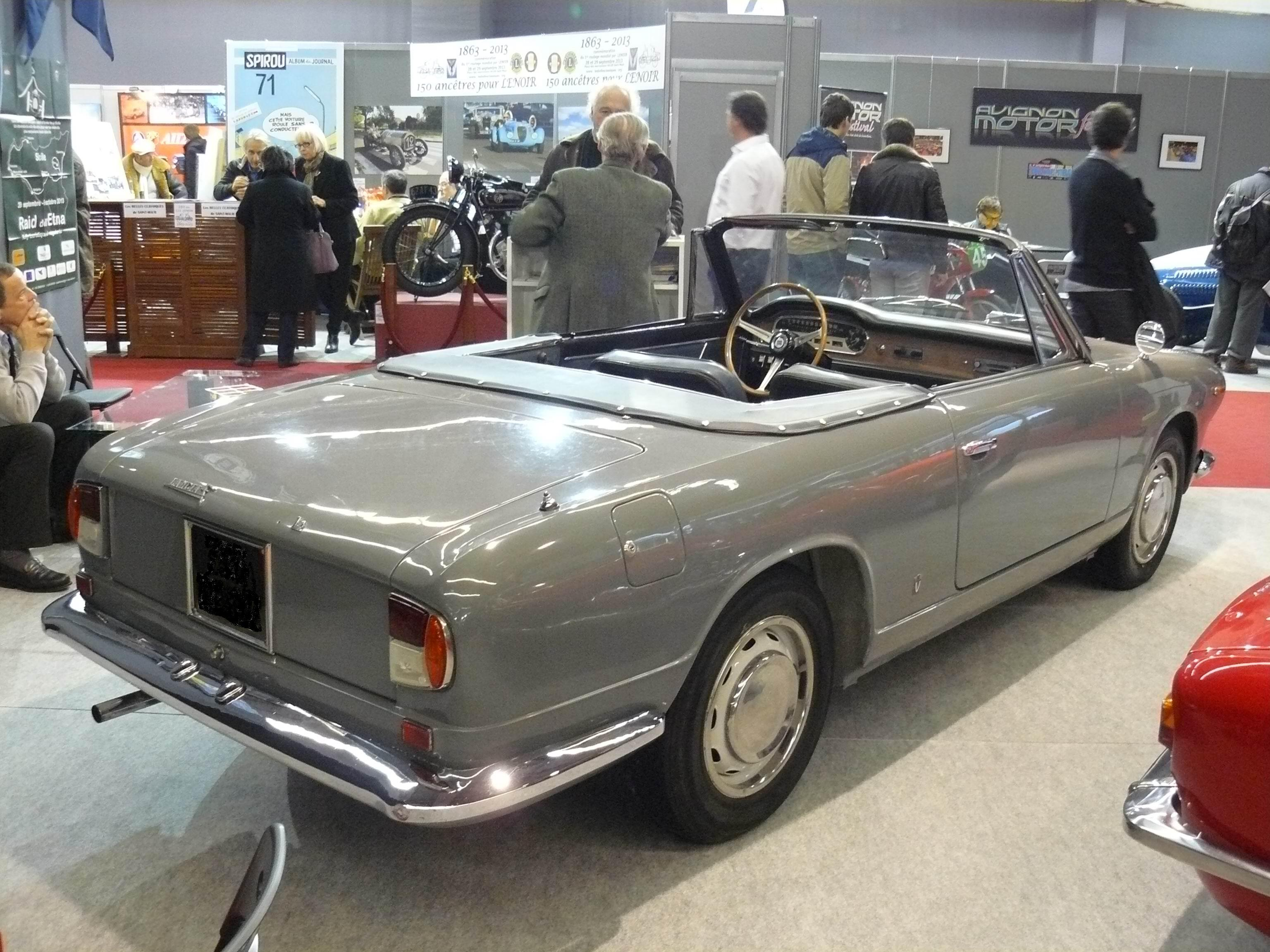 Retromobile 2013.